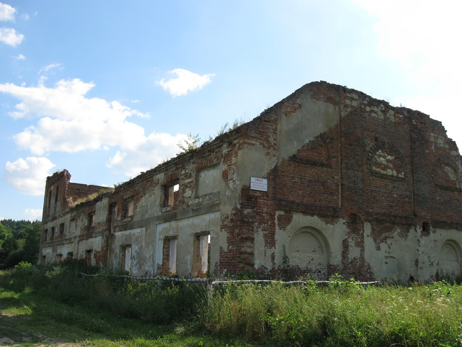 Zrujnowany młyn w Celejowie 09.1977.